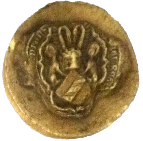 Présenté au Musée archéologique de Pons.